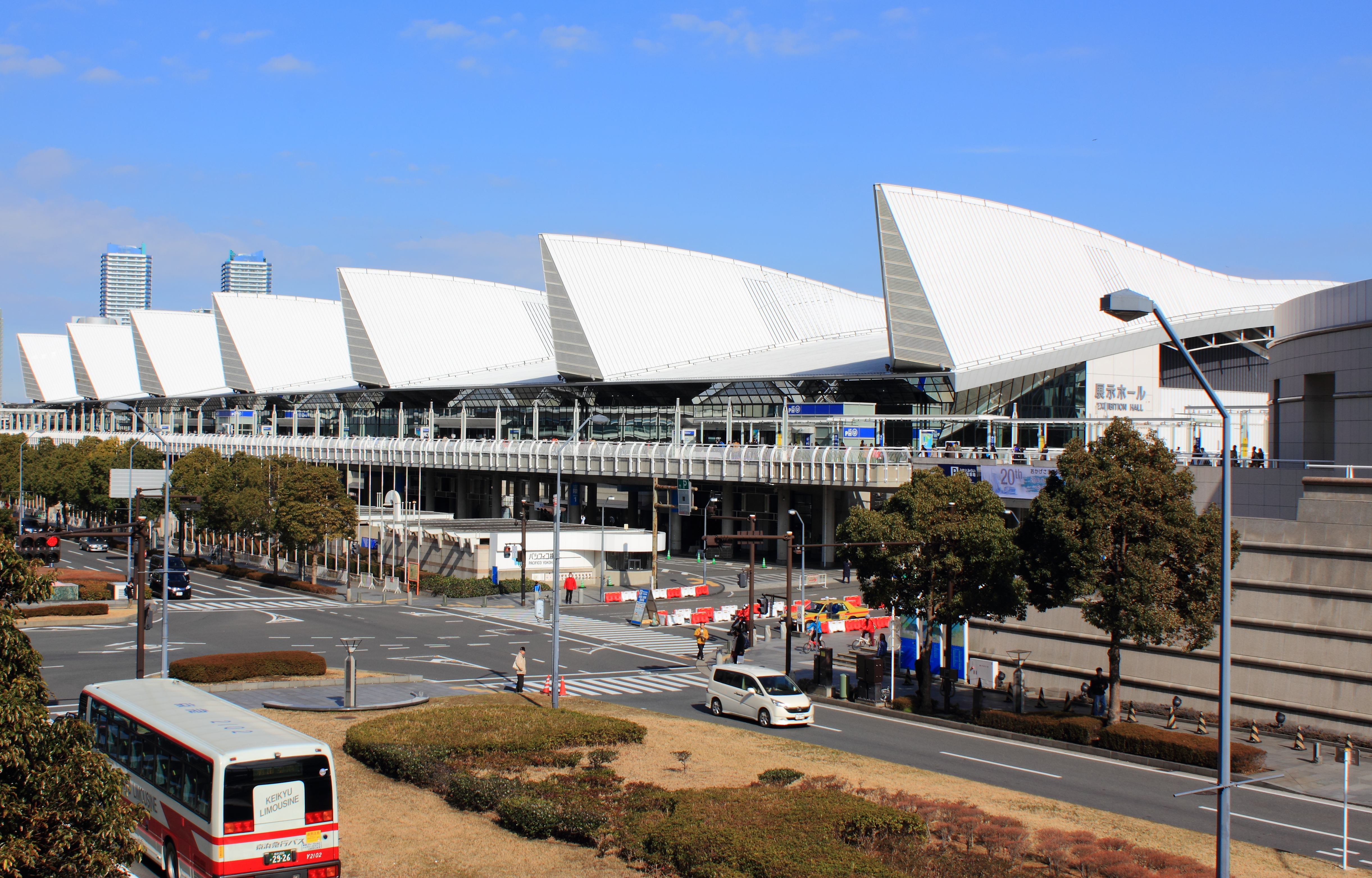 横浜国際平和会議場（展示ホール）